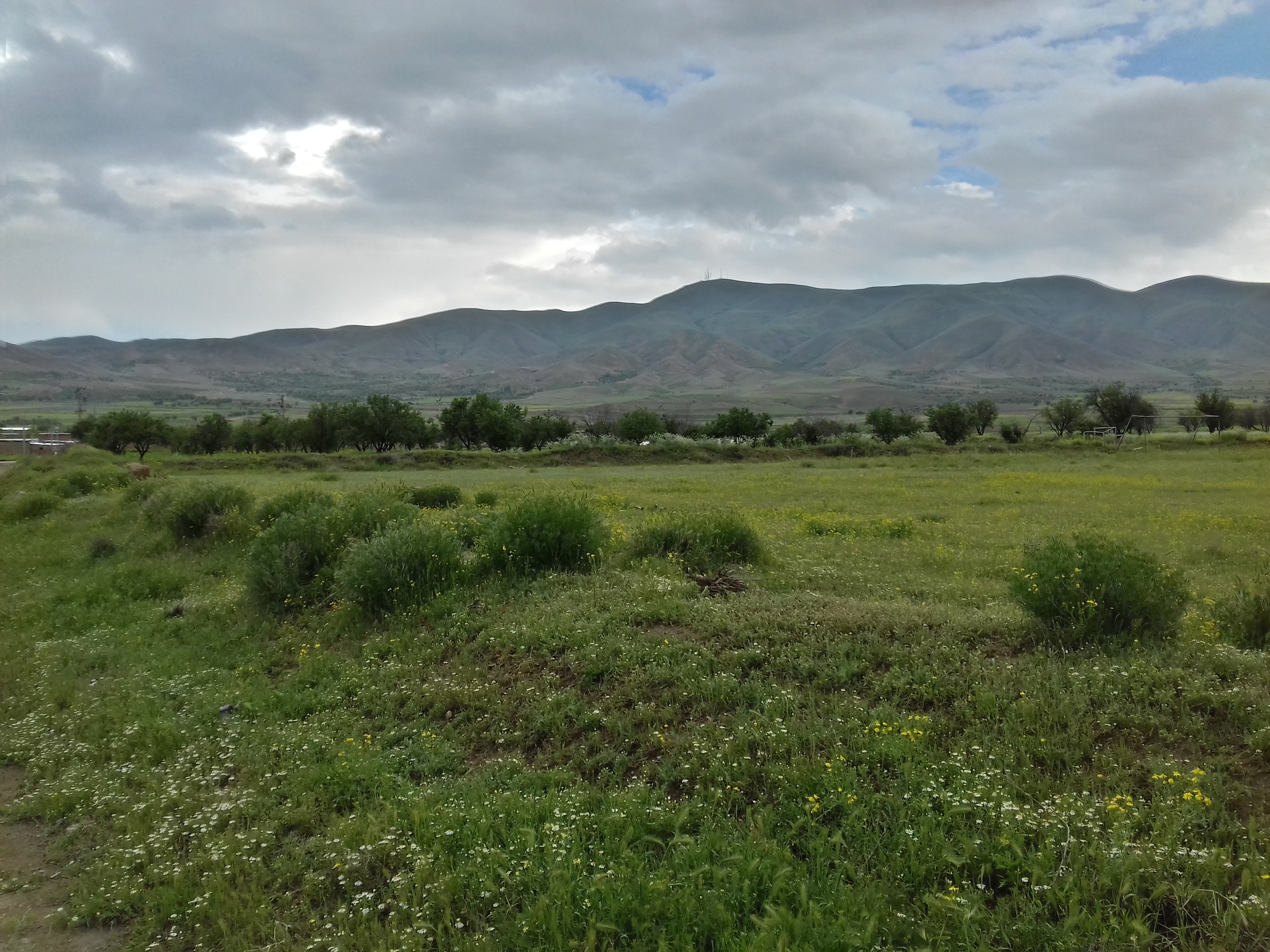 تصاویری از حومه روستای نجف آباد ارومیه، شامل طبیعت بکر و ورودی و... را مشاهده میکنید